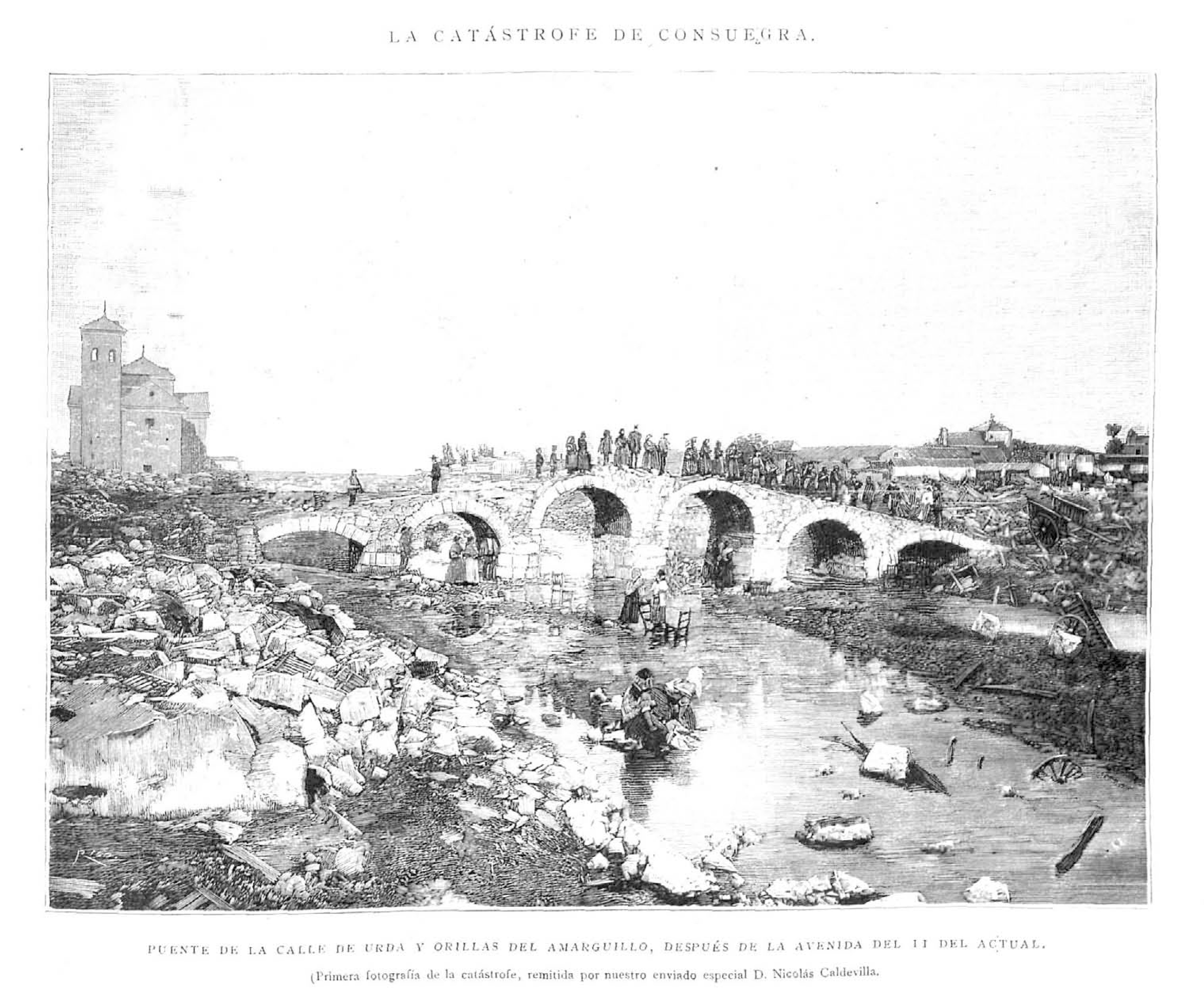 La catástrofe de Consuegra. Puente de la calle de Urda y orillas del Amarguillo, después de la avenida del 11 del actual ((primera fotografía de la catástrofe, remitida por nuestro enviado especial D. Nicolás Caldevilla).